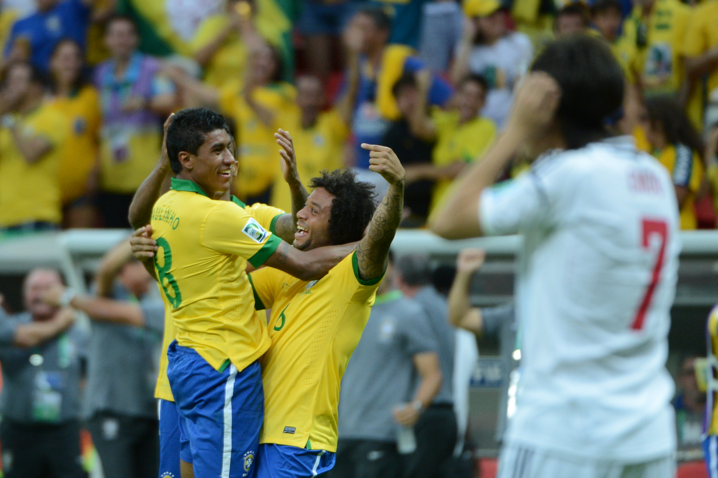 Jogo entre Brasil e Japão abre a Copa das Confederações